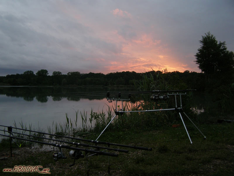 Šumbar??? or Ribnjaci Draganic in Recica